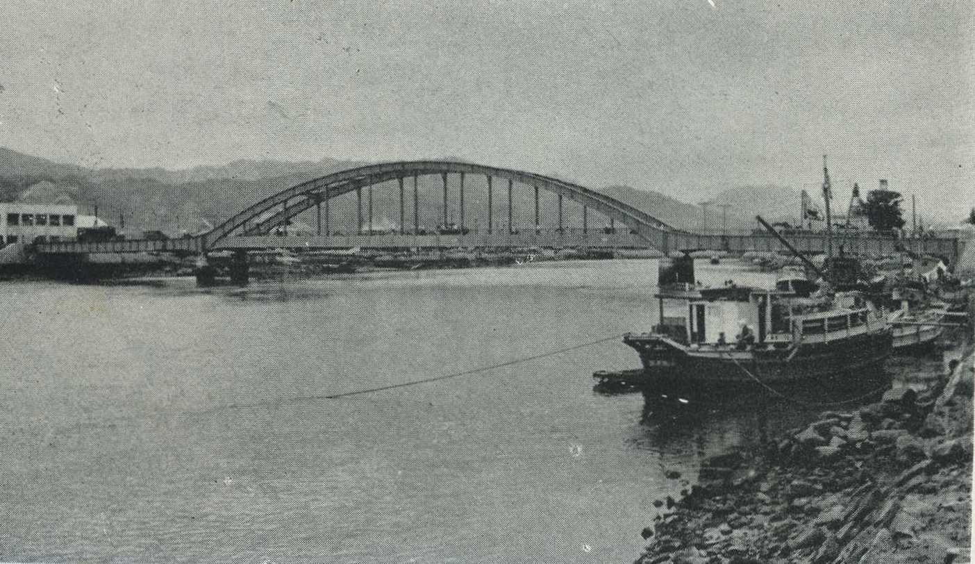 広島市の住吉橋。